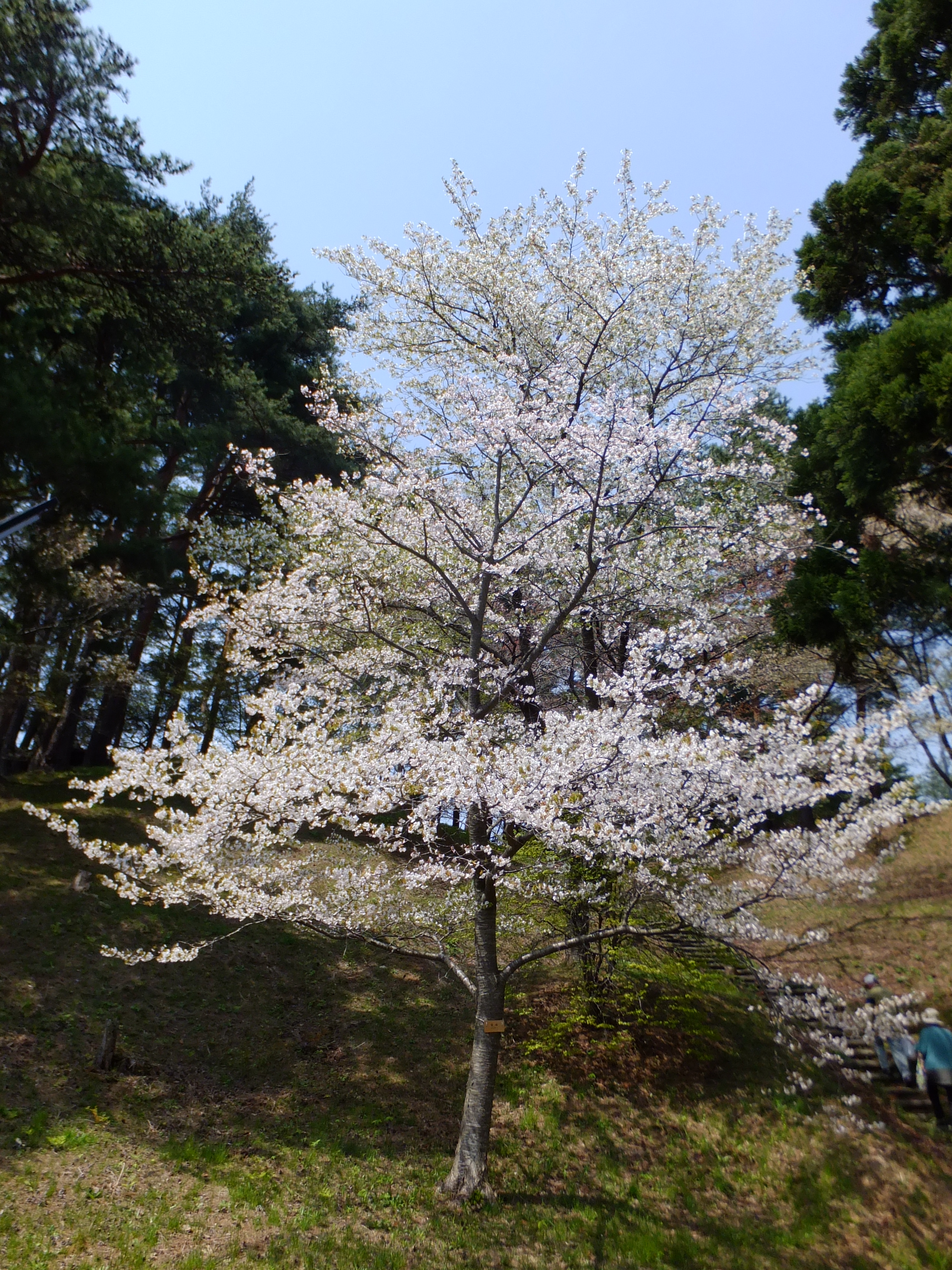 霞桜。日本国花苑（秋田県井川町）にて